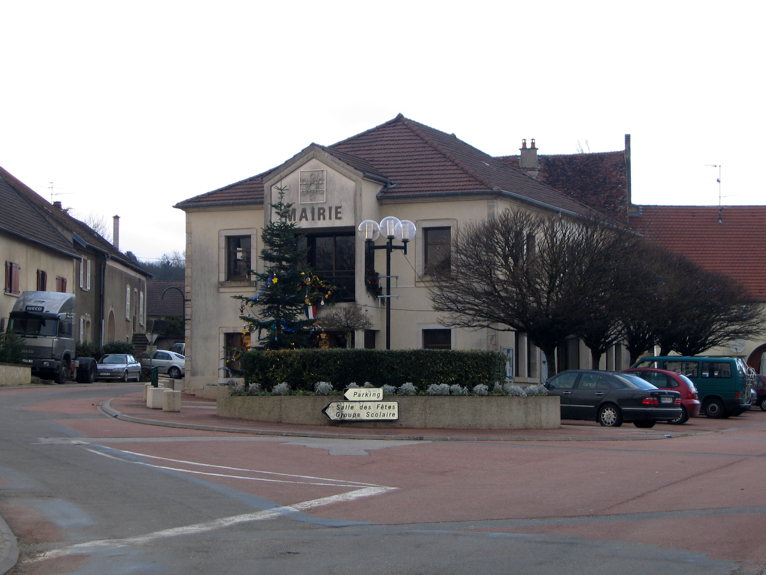 Mairie du village d'Authume